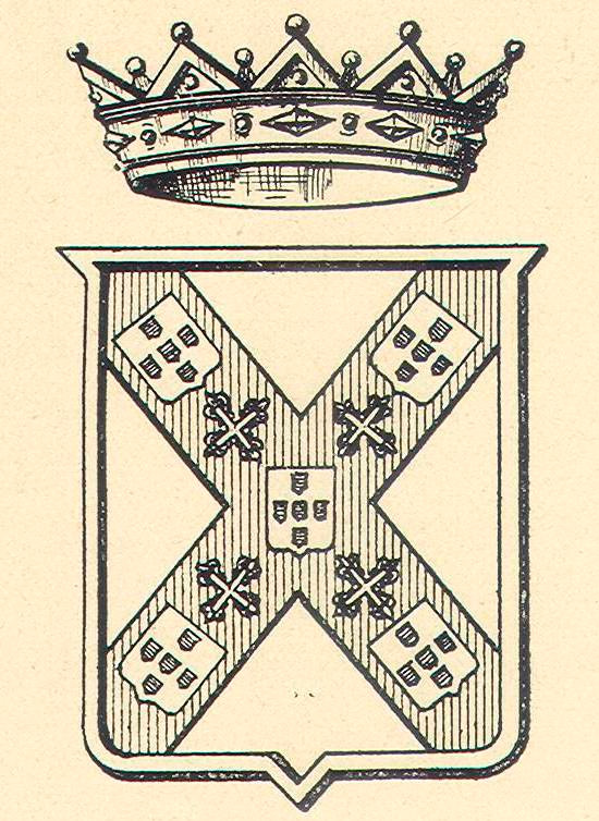 Brasão de armas dos contra de vimiero